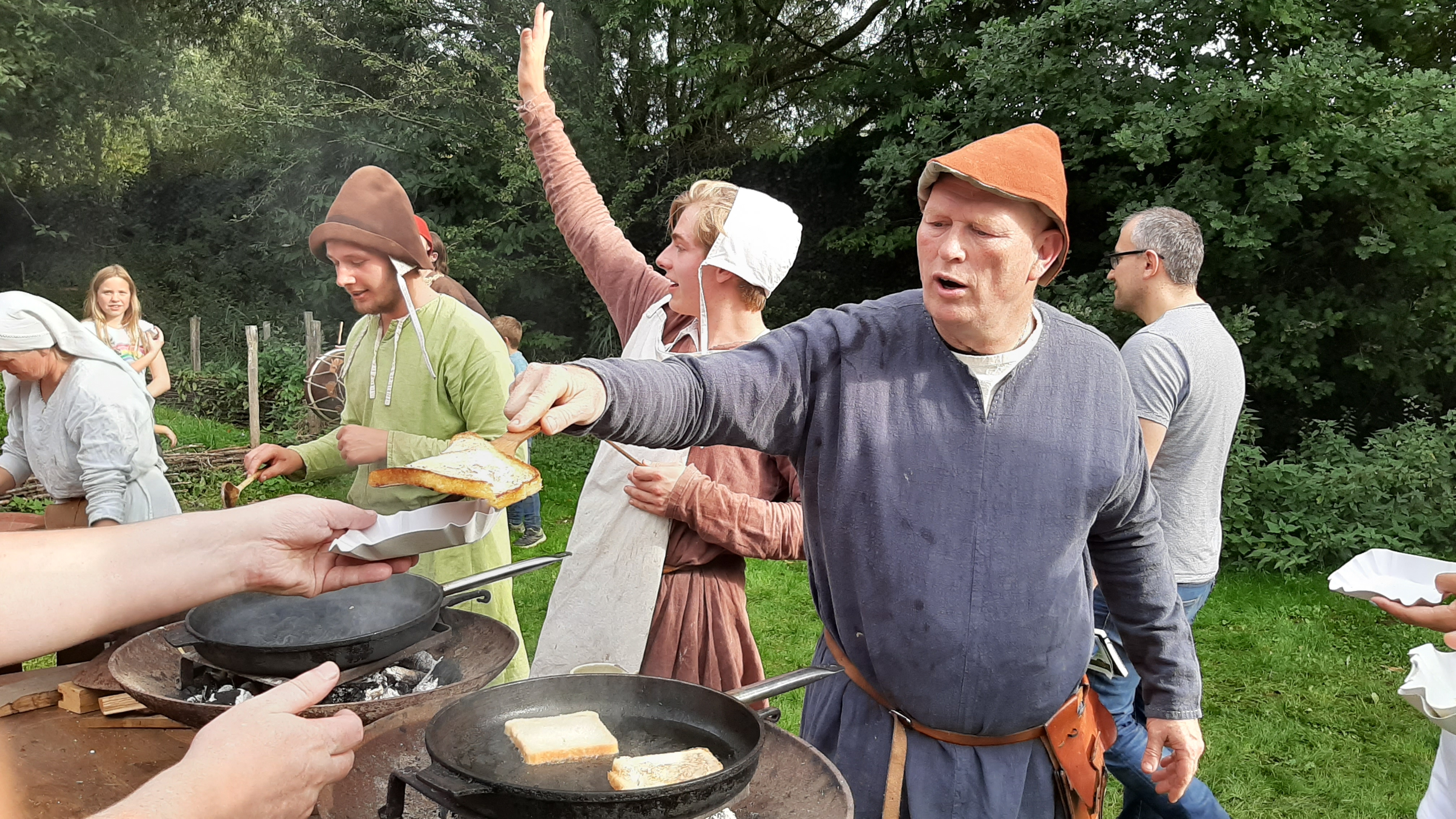 Archeon, Archäologischer Themenpark in Alphen aan den Rijn, Niederlande